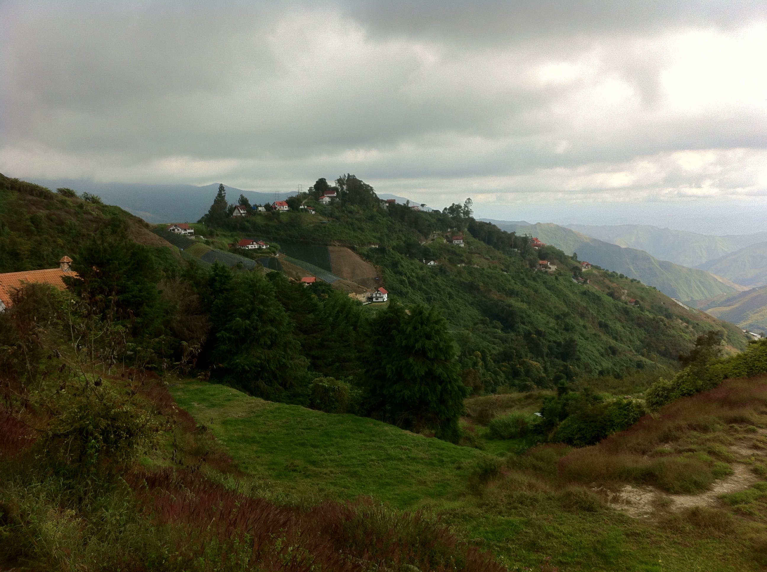 Colonia Tovar, vista desde el Hotel klein Dorf